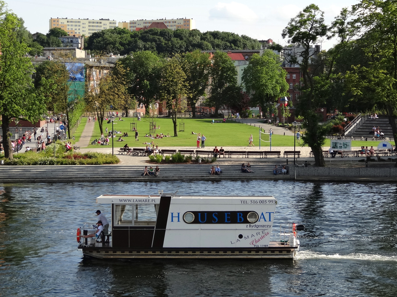 Nabrzeże północne Wyspy Młyńskiej w Bydgoszczy